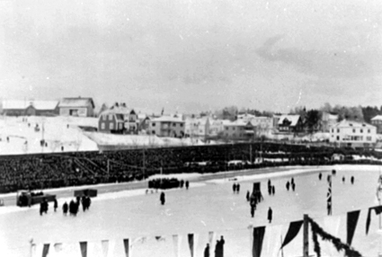 OVERSIKT HAMAR STADION, EUROPAMESTERSKAP SKØYTER 1934, VIMPLER, FOLK